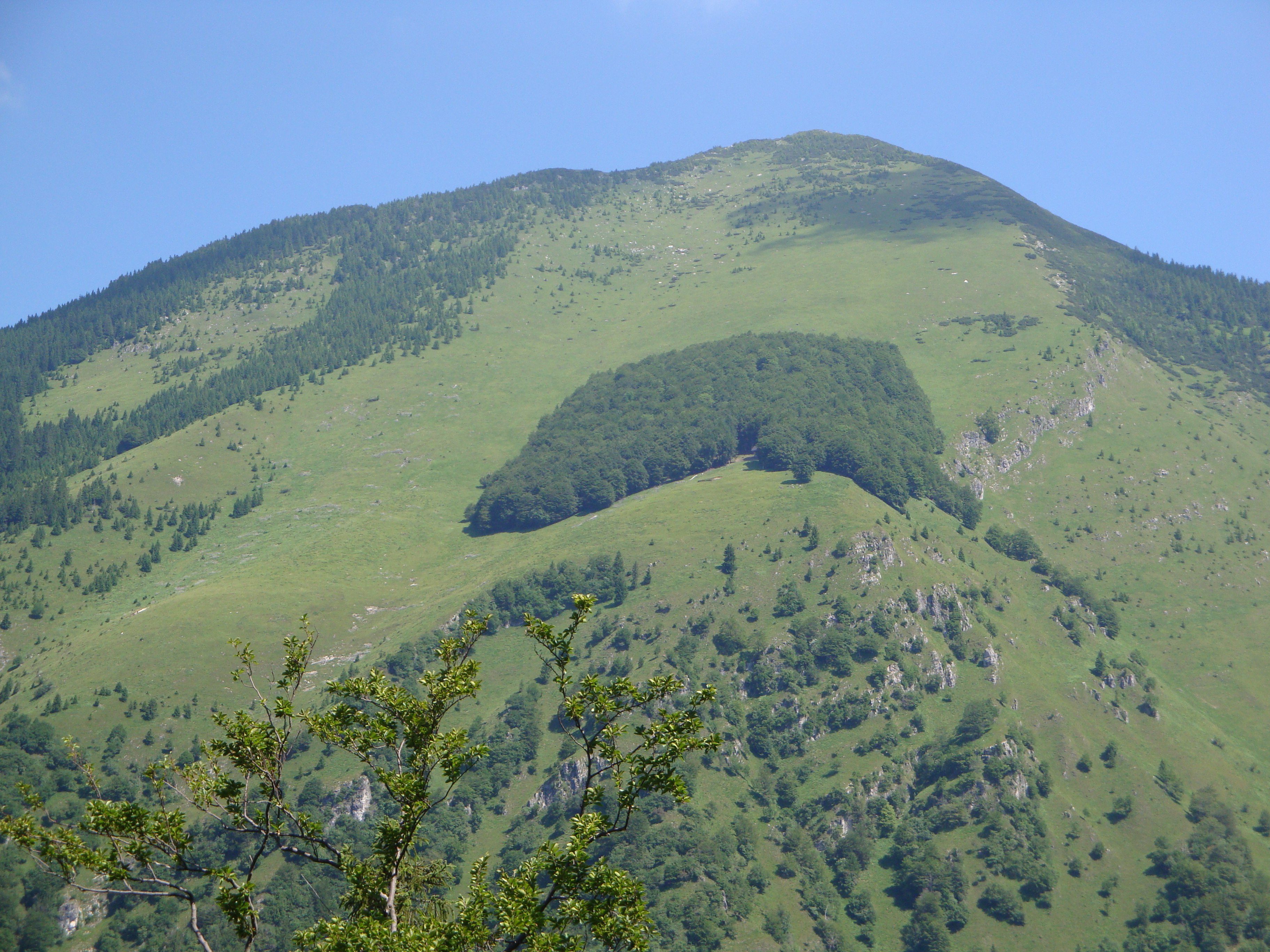 Hudičev boršt na pobočju Zaplate. Slikano s Sv. Jakoba.